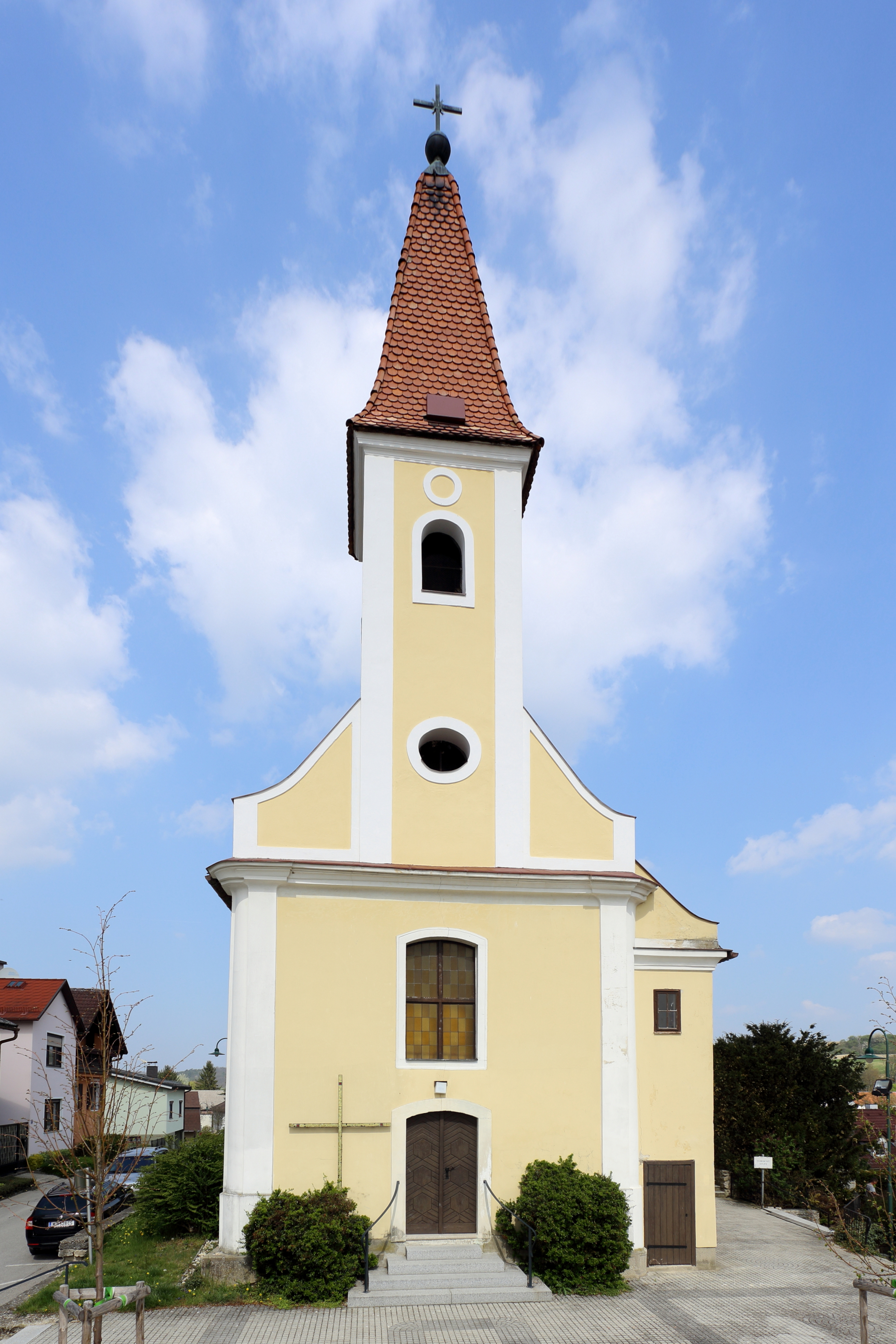 Die katholische Filialkirche hl. Lambert in Hautzendorf, ein Ortsteil der niederösterreichischen Gemeinde Kreuttal. Die Kirche befindet sich auf einer leicht erhöhten Lage im Nordosten des Dorfes. Das Langhaus wurde 1787 errichtet und 1951 erweitert.